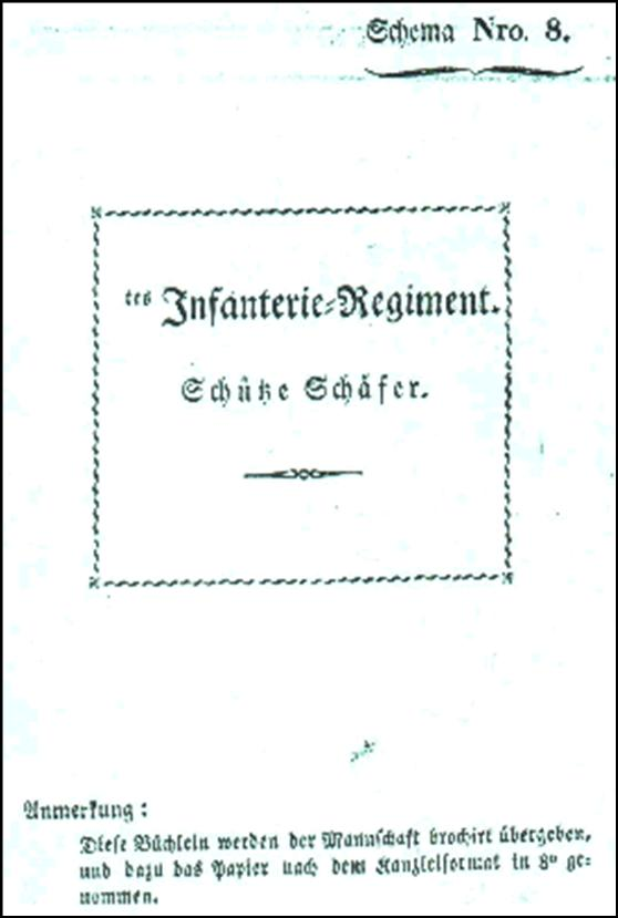 Vorschfit für die Titelseite eines württembergischen Abrechnungsbüchleins von 1824